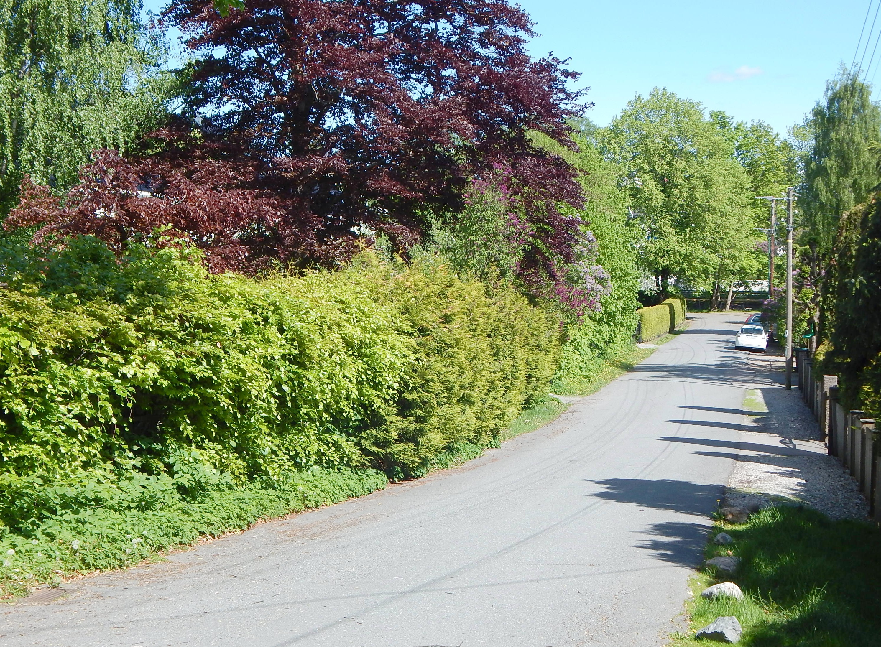 Jacob Hansens vei